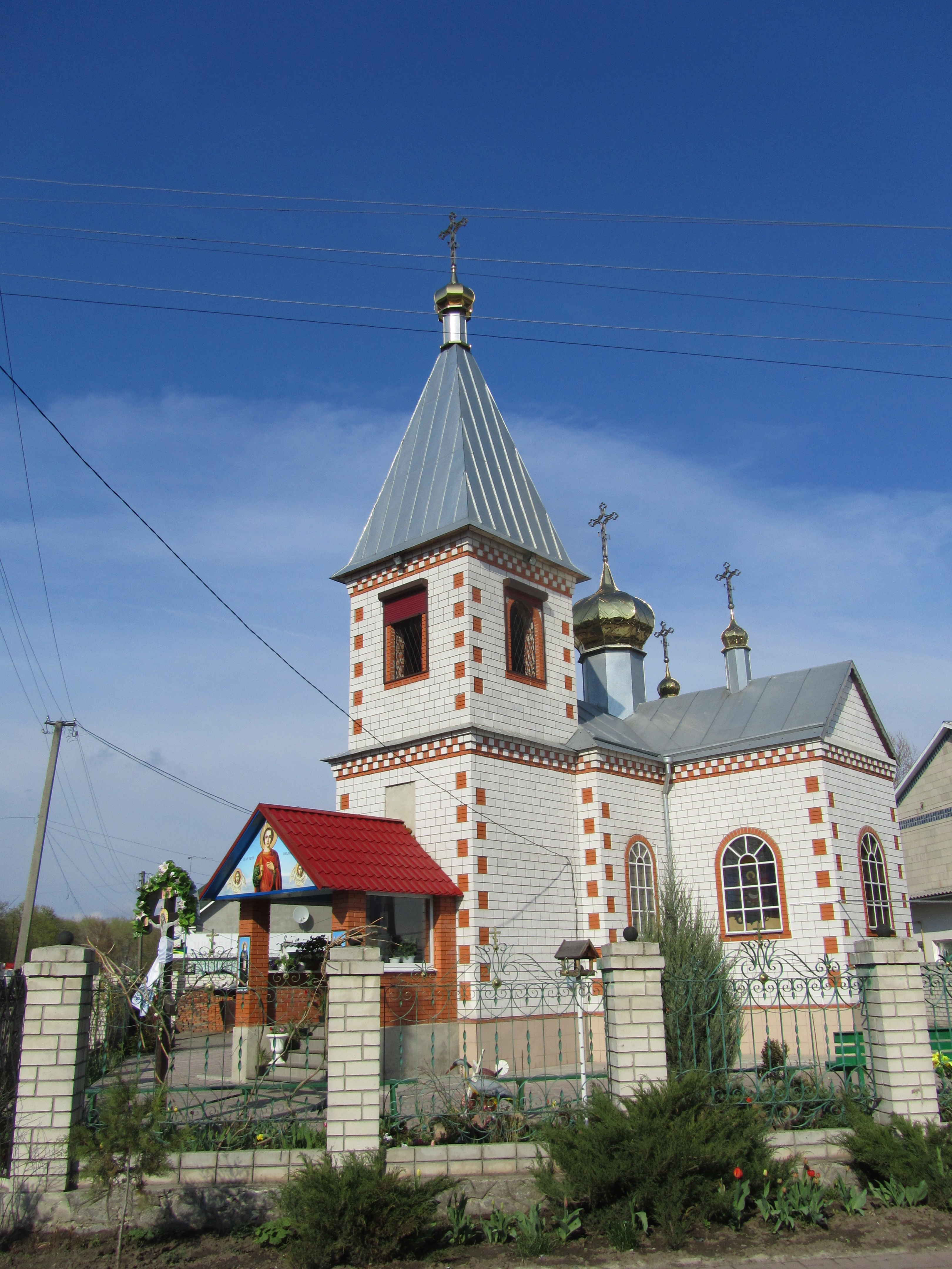 Храм у Градизьку